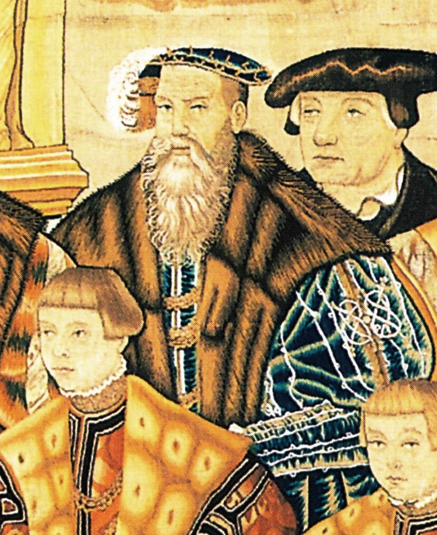 Wirkerei von Herzog Barnim IX. von Pommern, Ausschnitt aus dem Croy-Teppich